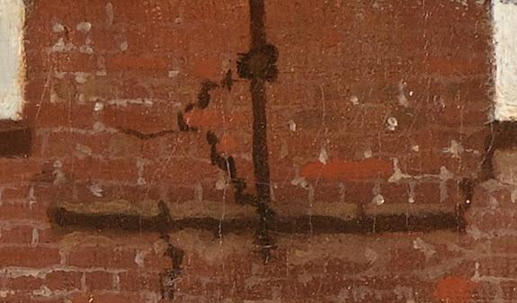 Vermeer La Ruelle detail creneau superieur